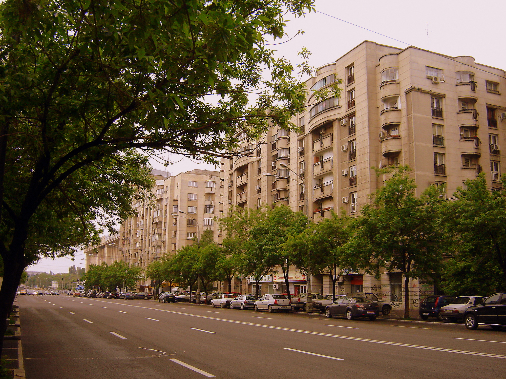 Bucuresti boulvard